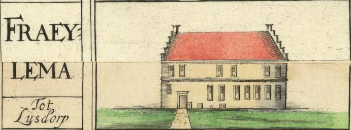 Borg Fraeylema te Losdorp